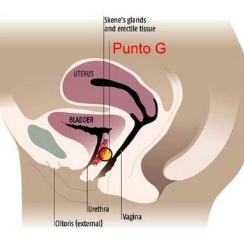 Ubicación de la gandula de skene. (Punto G)